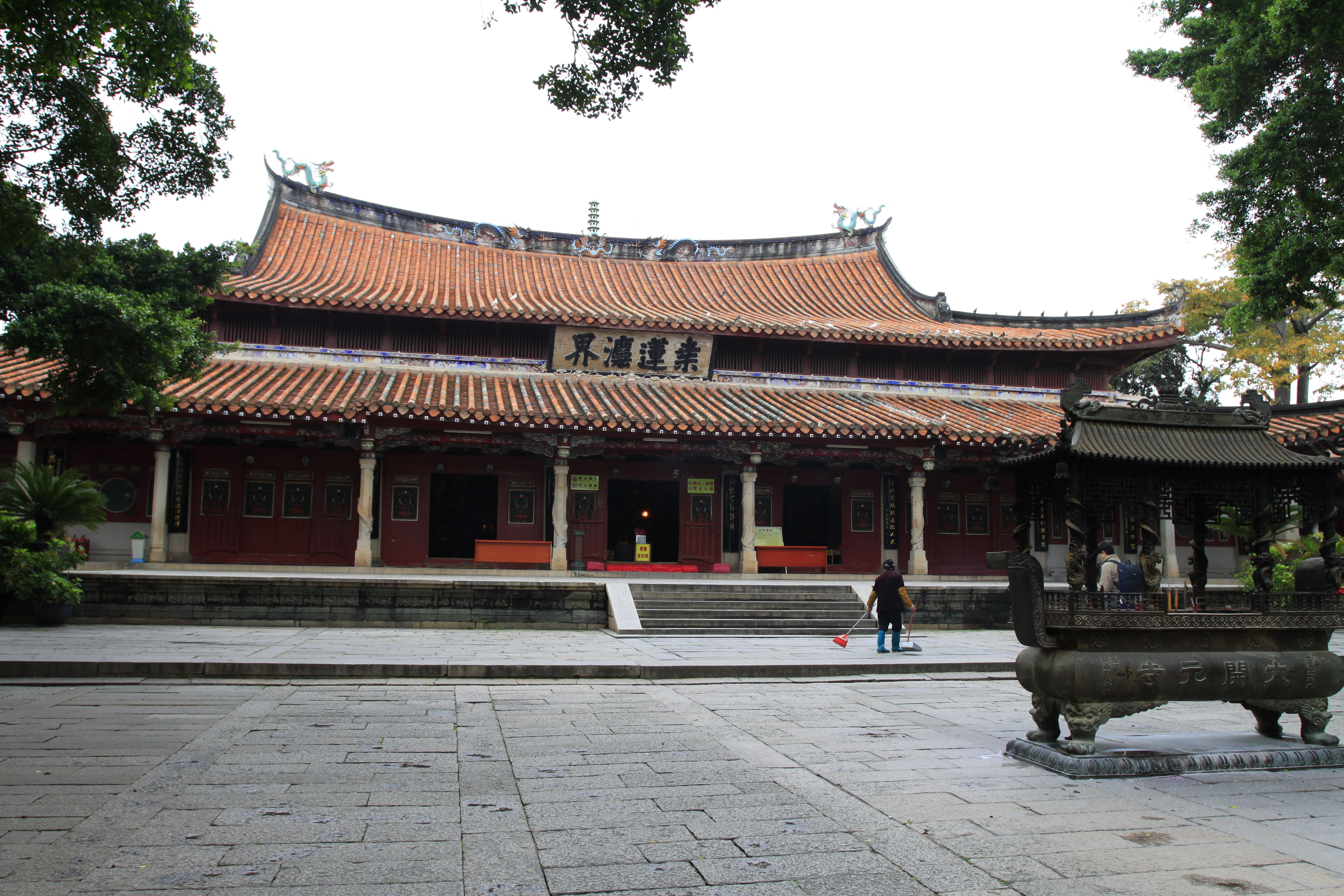 开元寺大雄宝殿，位于中国福建省泉州市，是全国重点文物保护单位。